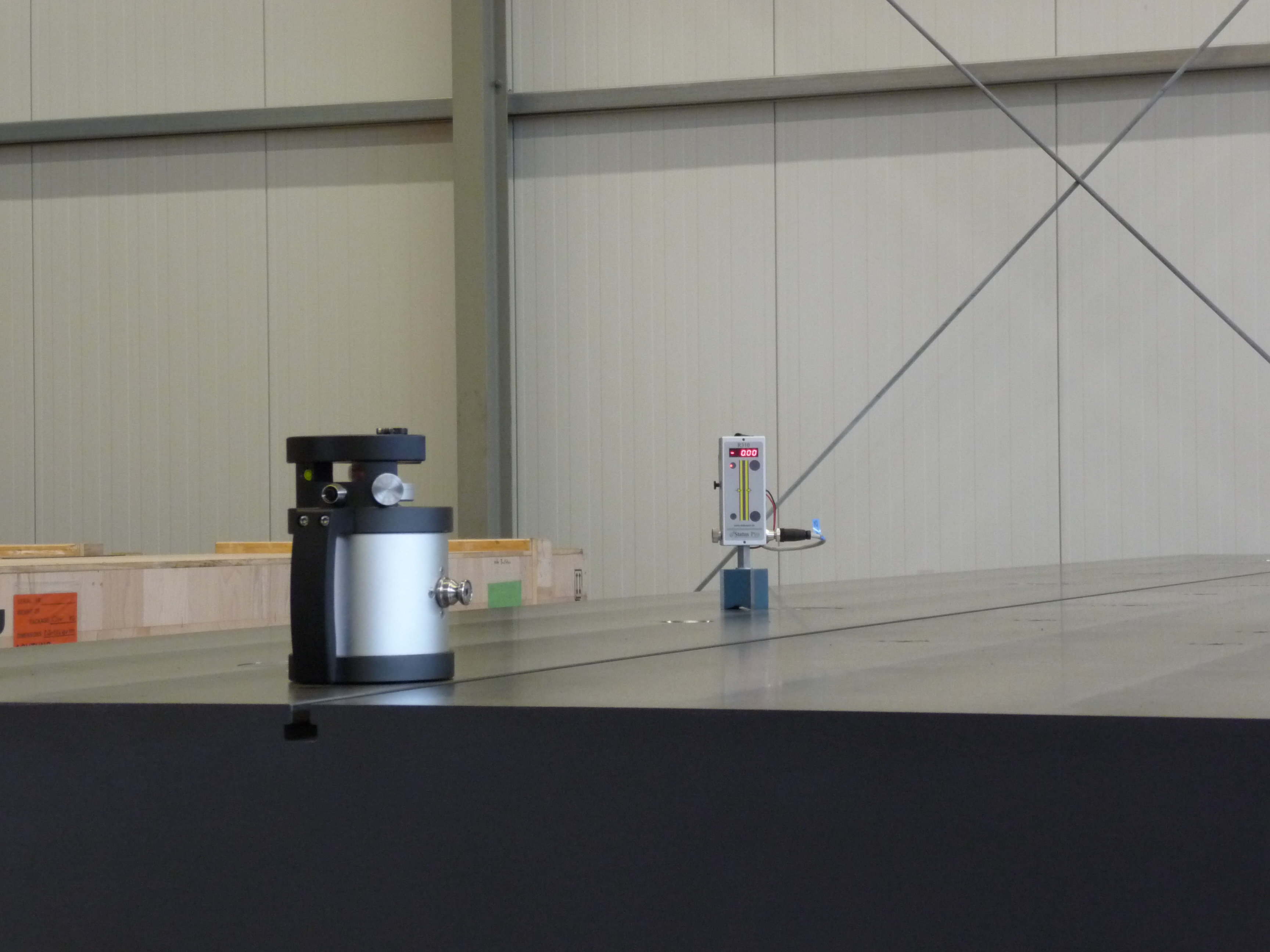 Ebenheitsmessung eines Maschinentisches mit Rotationslaser und Empfänger